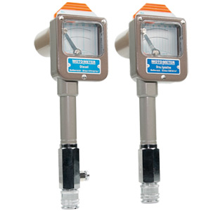 Kompressionsdruckschreiber für Otto- und Dieselmotor